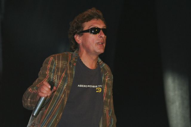 Janusz Panasewicz, wrzesień 2006